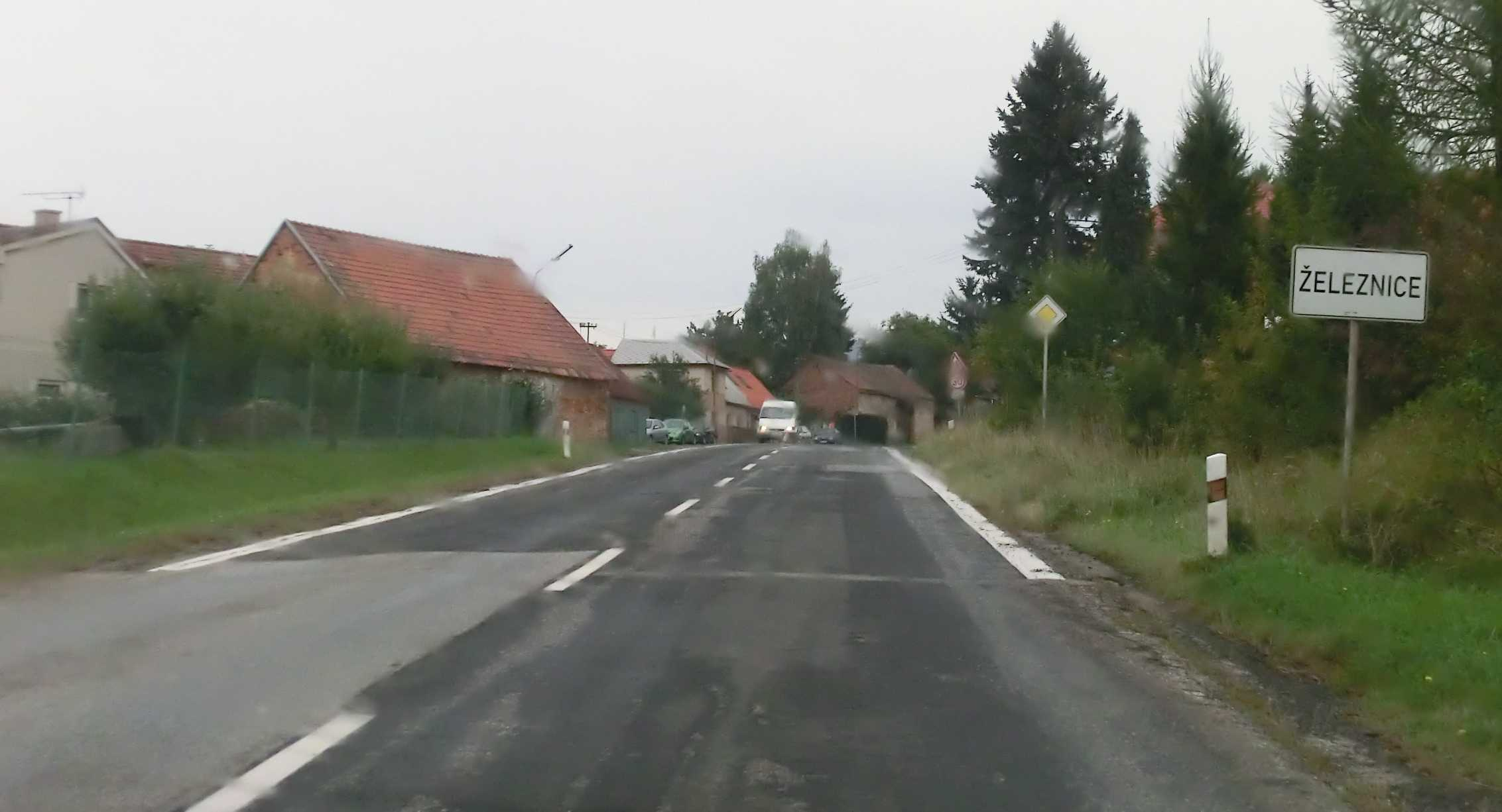 Vjezd do městečka Železnice od Jičína - je viditelné rychlostní omezení okolo základní školy